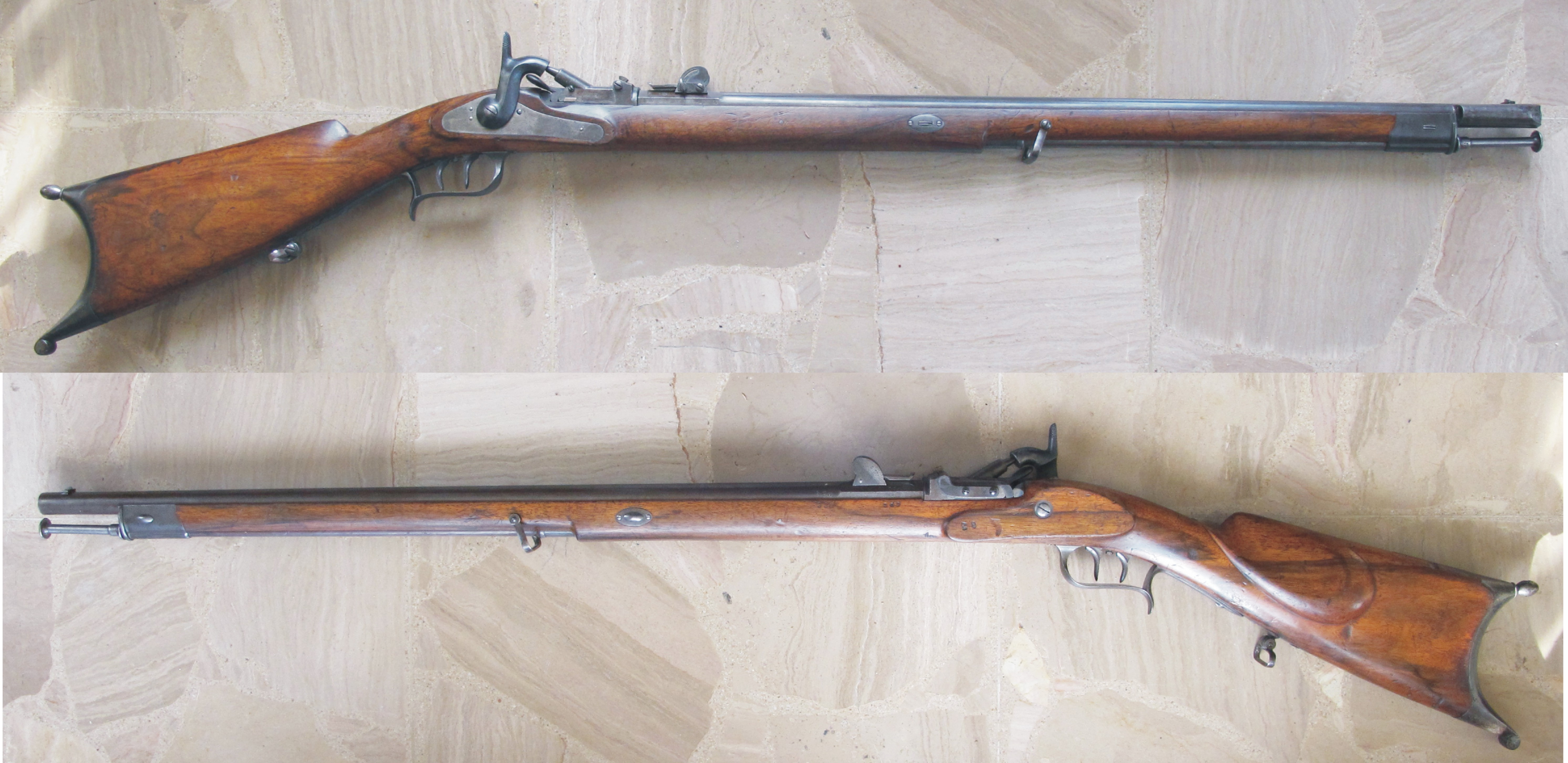 Carabine fédérale 10.5mm, modèle de 1851/67 modifiée au système de chargement par la culasse Amsler-Milbank. Crosse avec appui-joue sur la face gauche, particularité des carabines du canton de Zurich